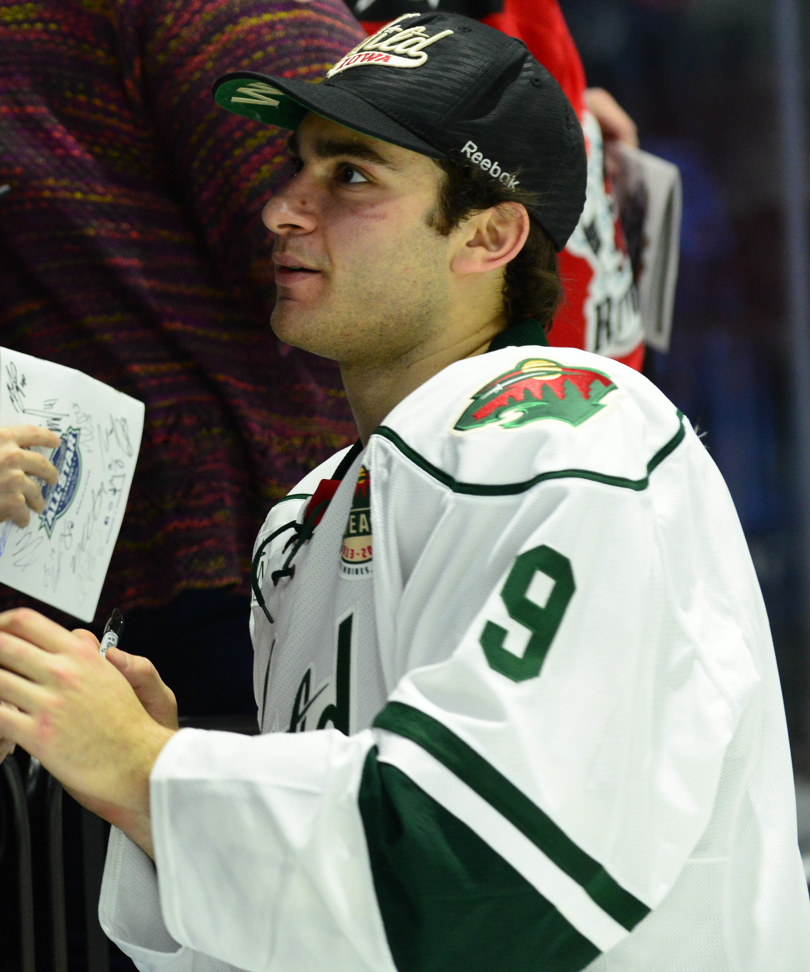 (Bryan Peck/ AHL)